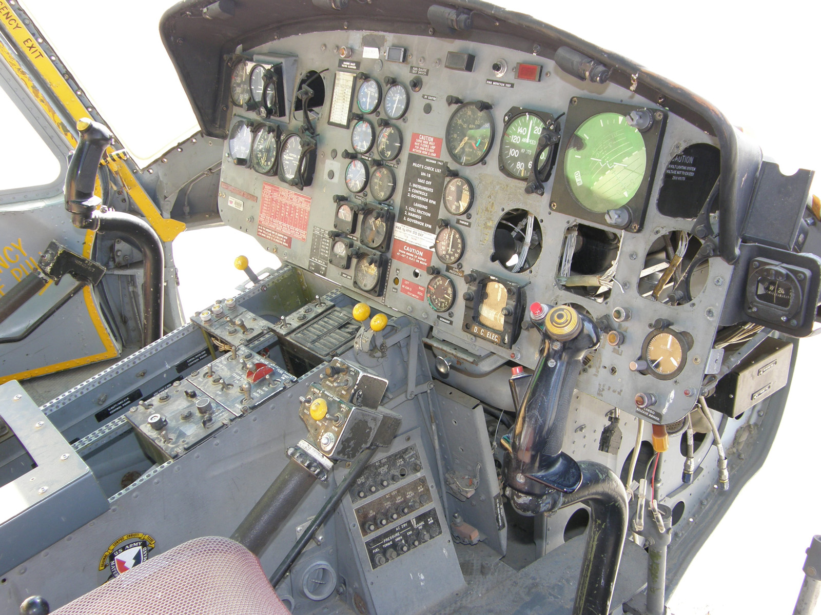 Instrument panel from a Bell UH-1B / 204